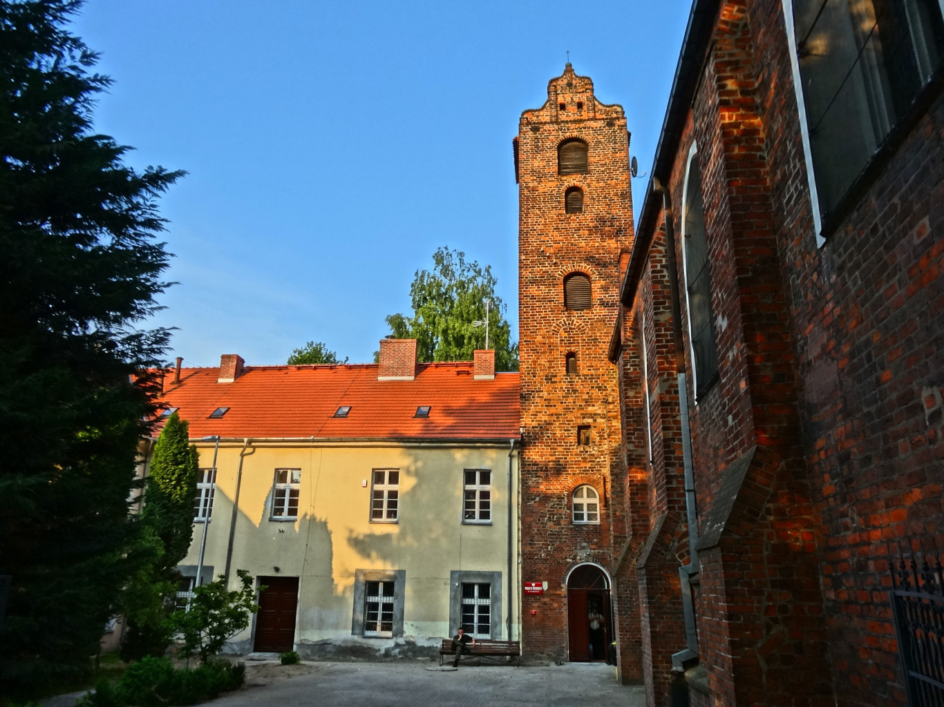 Kościół pobernardyński p.w. Najświętszej Maryi Panny Królowej Pokoju, zbud. 1552-1557, do 1830 kościół klasztorny bernardynów bydgoskich, od 1866 r. garnizonowy; na zdj. dawny klasztor bernardynów